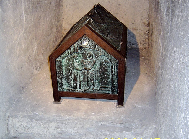 Walburgaschrein in der St. Walburgakirche in Meschede, Germany.